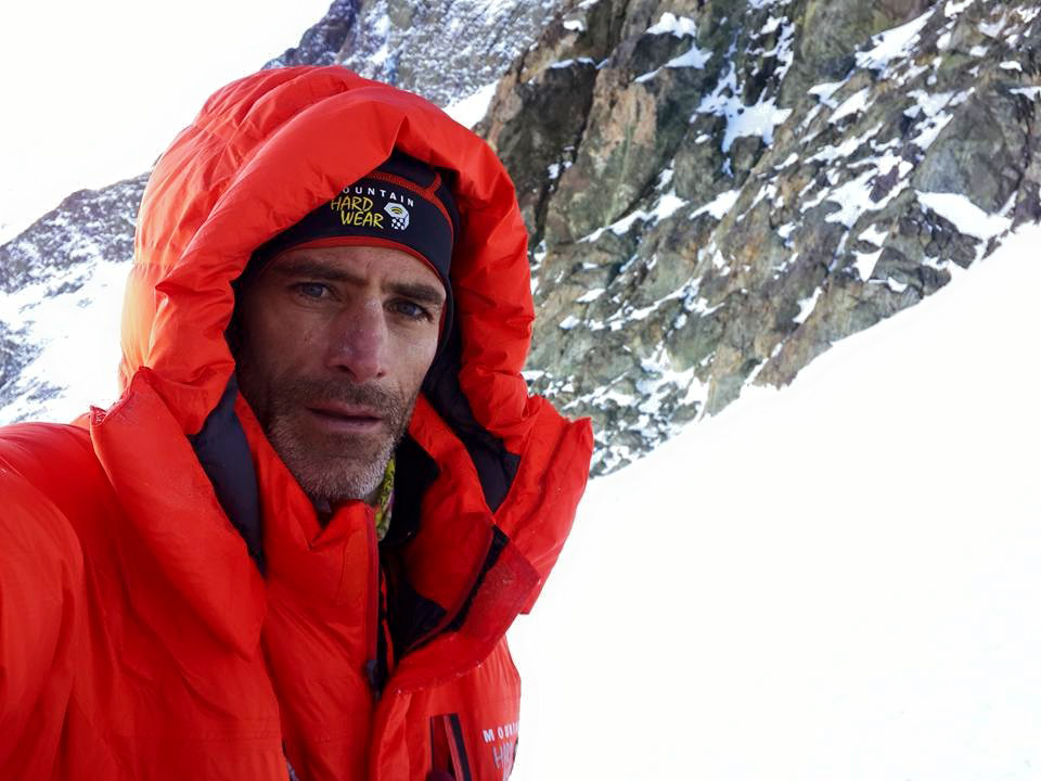 Mariano Galván